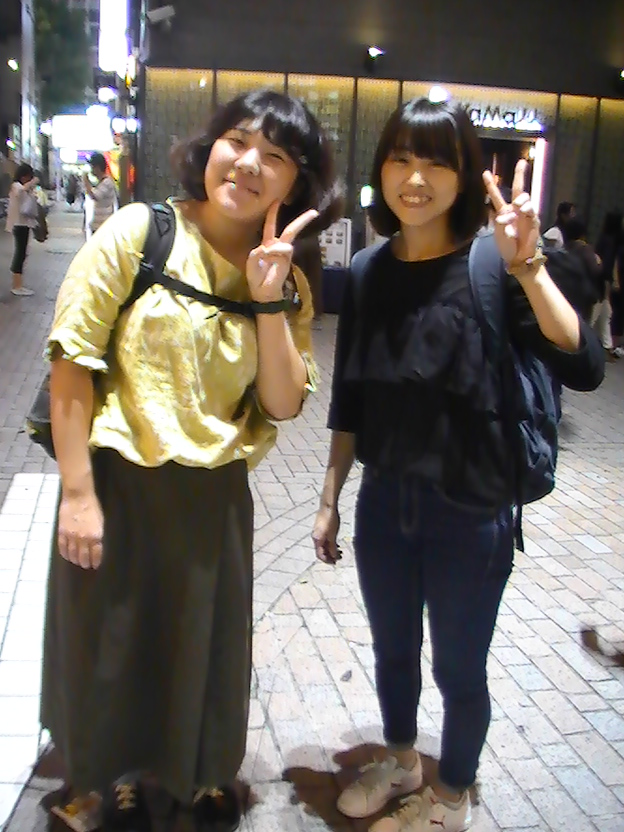 ガール座 (2017年9月5日)